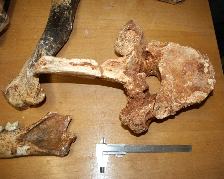 kralješak slona pronađen u jami Vrtare male u Dramlju, Hrvatska